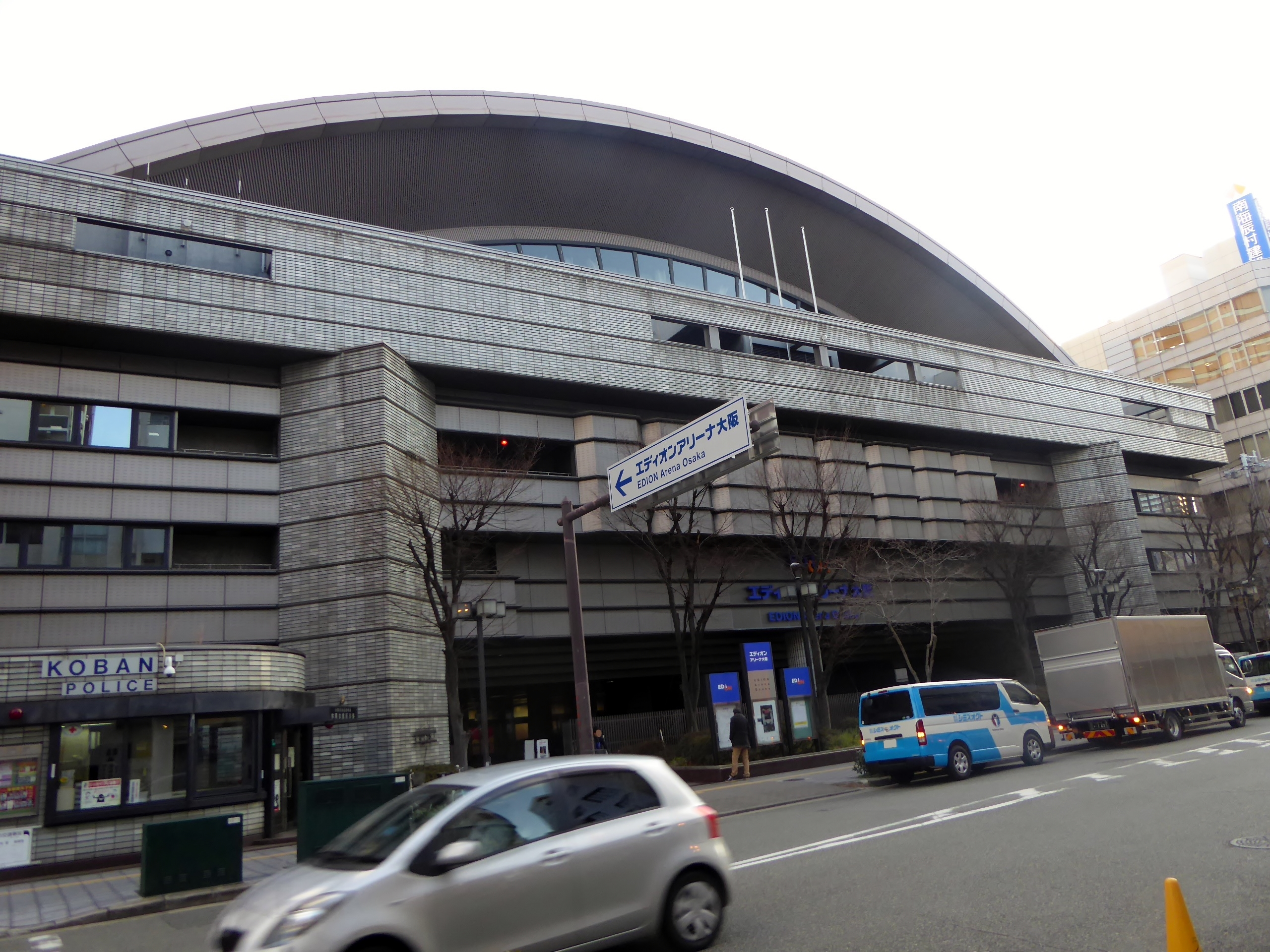 大阪府立体育会館を撮影。